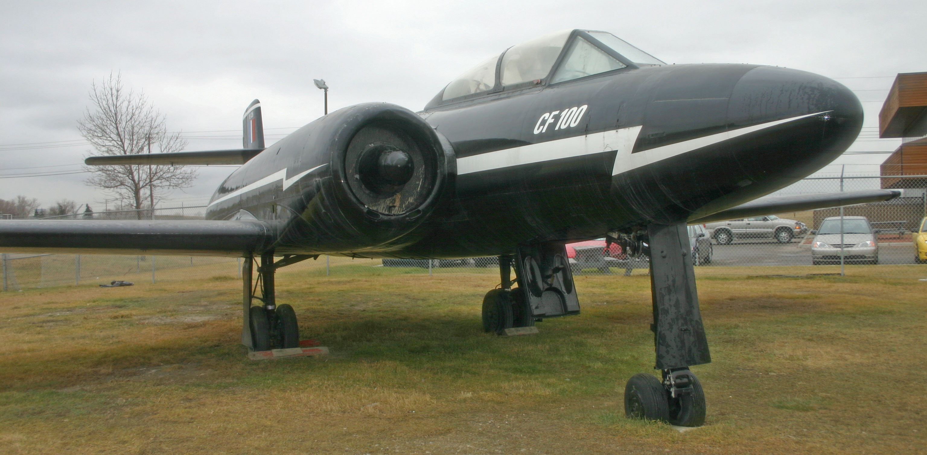 Sujet:En CF-100 Mk 3 gesprëtzt wéi de Prototyp am Calgary AeroSpace Museum.